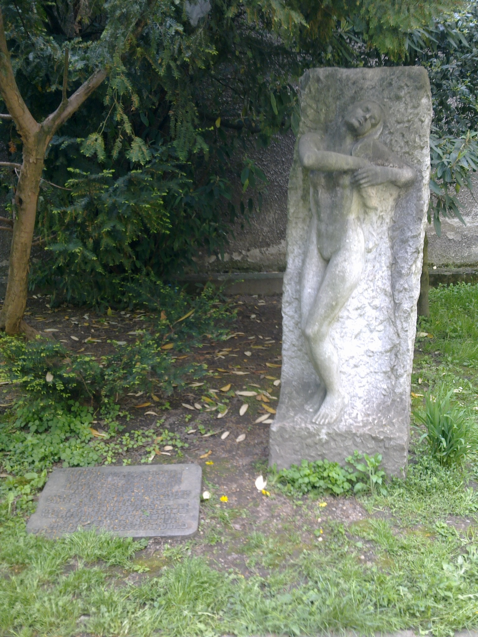 Marmorstatue "Mädchenakt" (Josef Thorak). Gedenkstein an Opfer von Fliegerbomben auf die Otto-Glöckel-Schule.